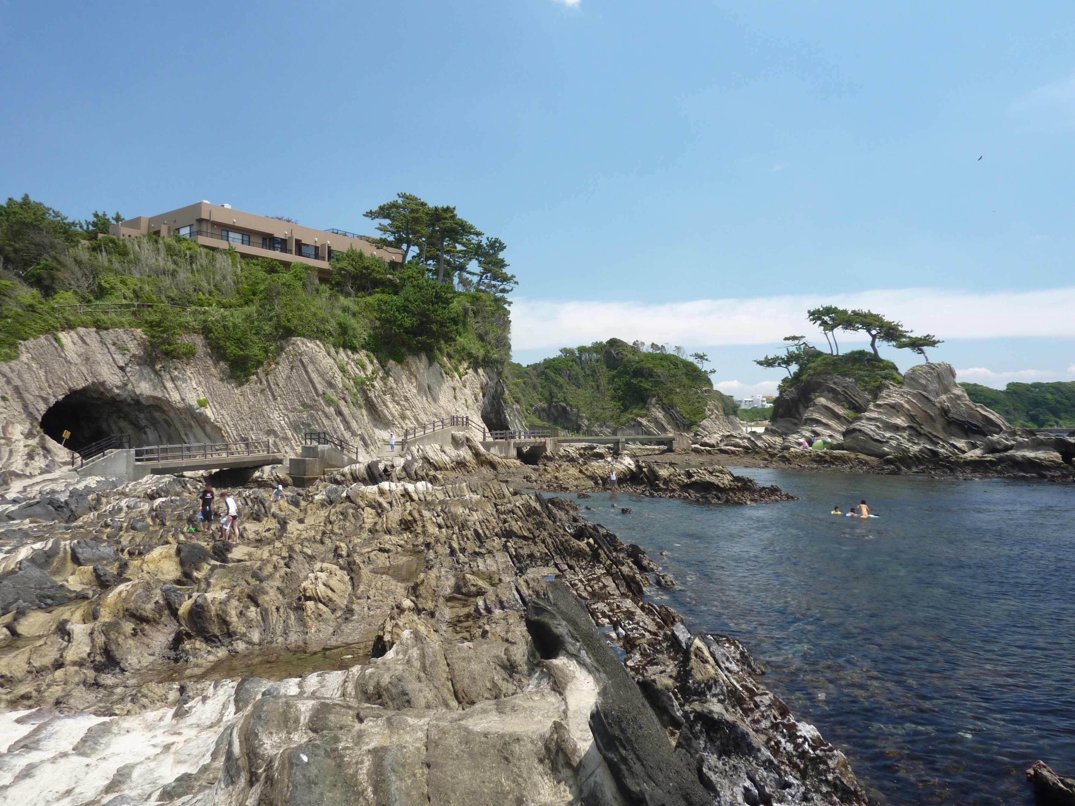 神奈川県横須賀市 荒崎公園